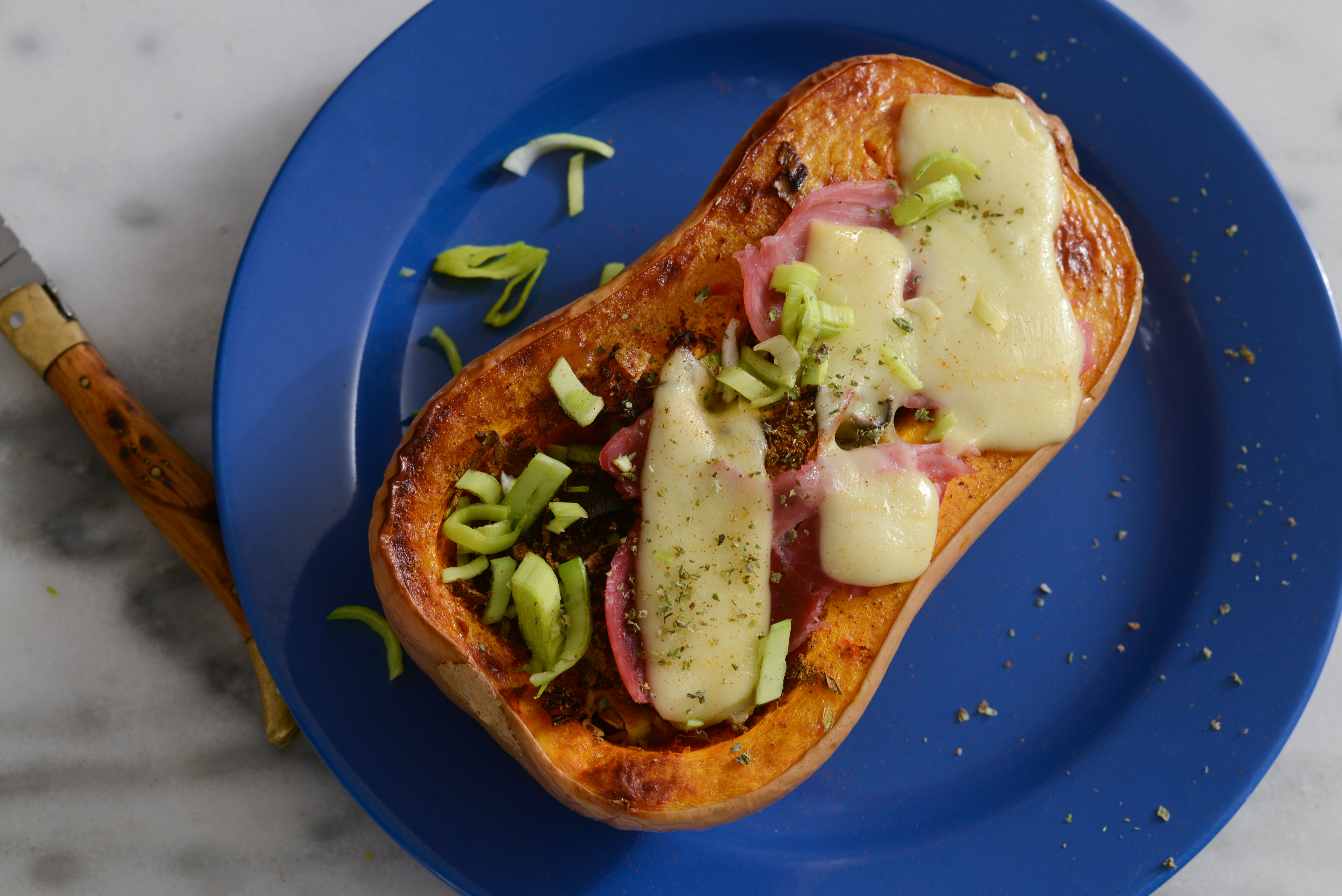 Courge butternut au four. Ingrédients: Poireaux, jambon de Bayonne, raclette, sel de Guerlande, épices (diverses et variées, dont poivre et pimentón), origan, un fil d'huile d'olive et sirop d'érable.